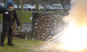 Description Forage d'aluminium avec lance thermique ATTS DateFebruary 2007SourceATTS Lance thermiqueAuthorMoi Forage d'aluminium avec lance thermique ATTS